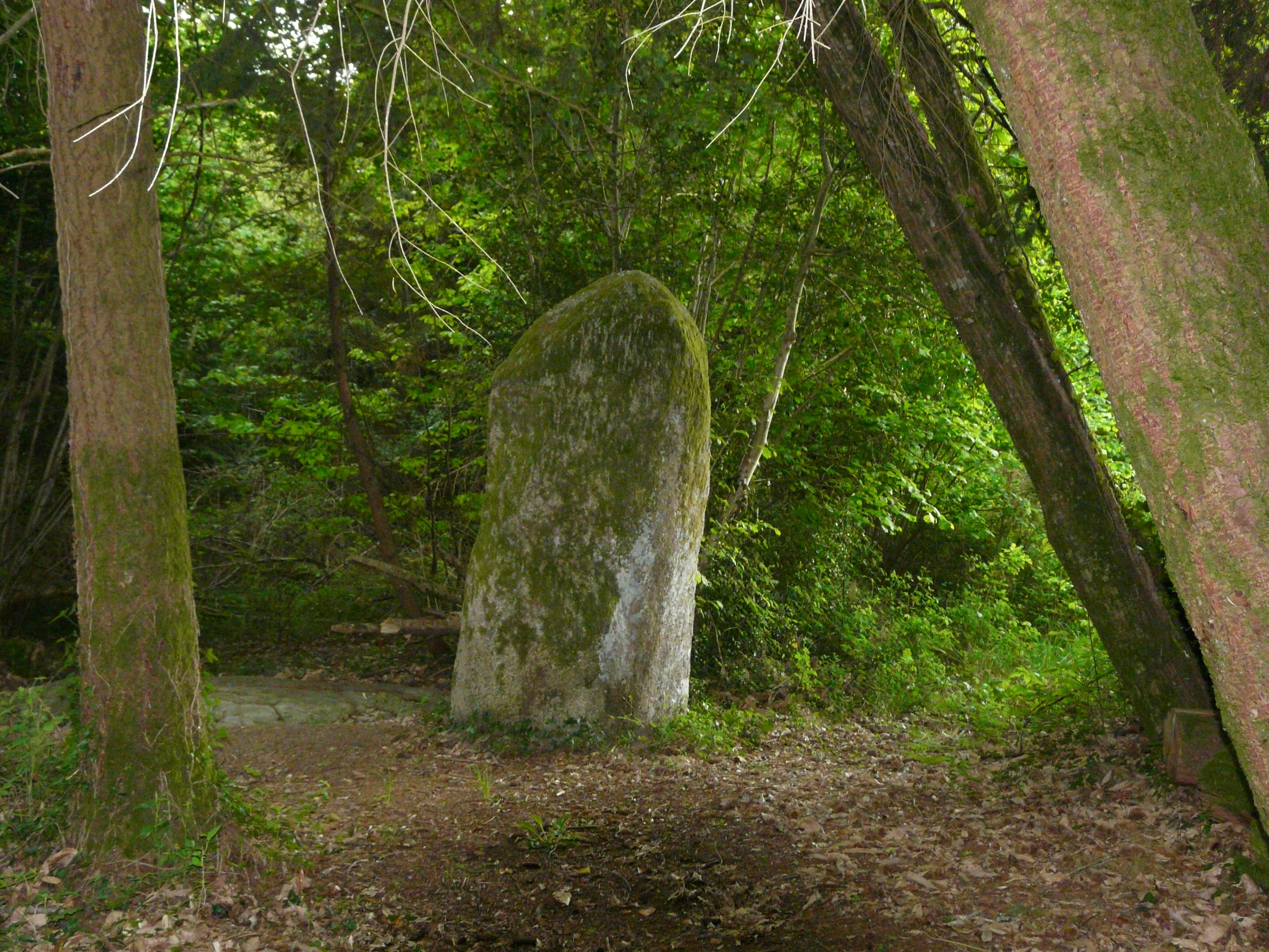 Le menhir de Fixard, Saint-Estèphe, Dordogne, France.